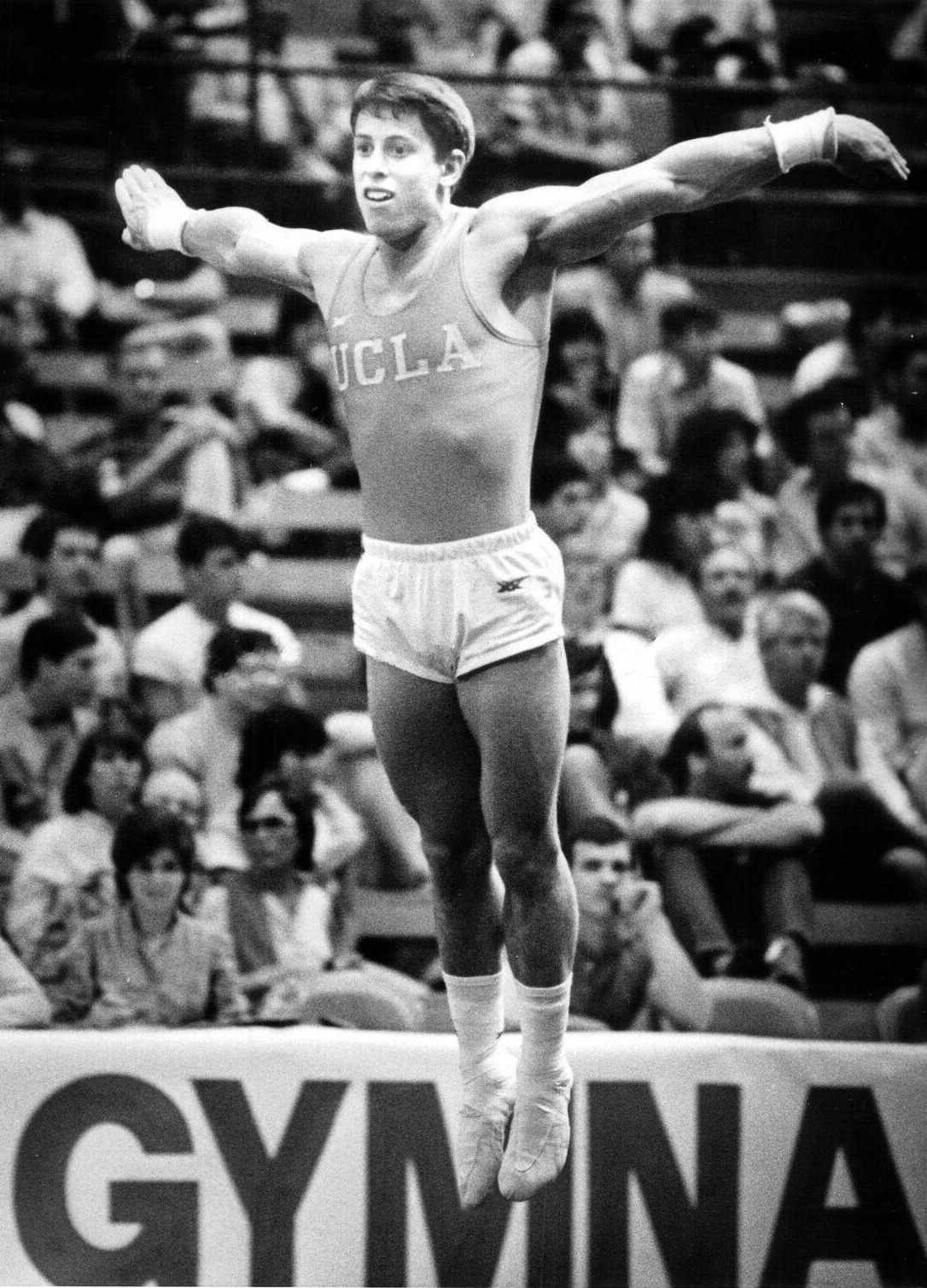 1984 Press Photo Tim Daggett